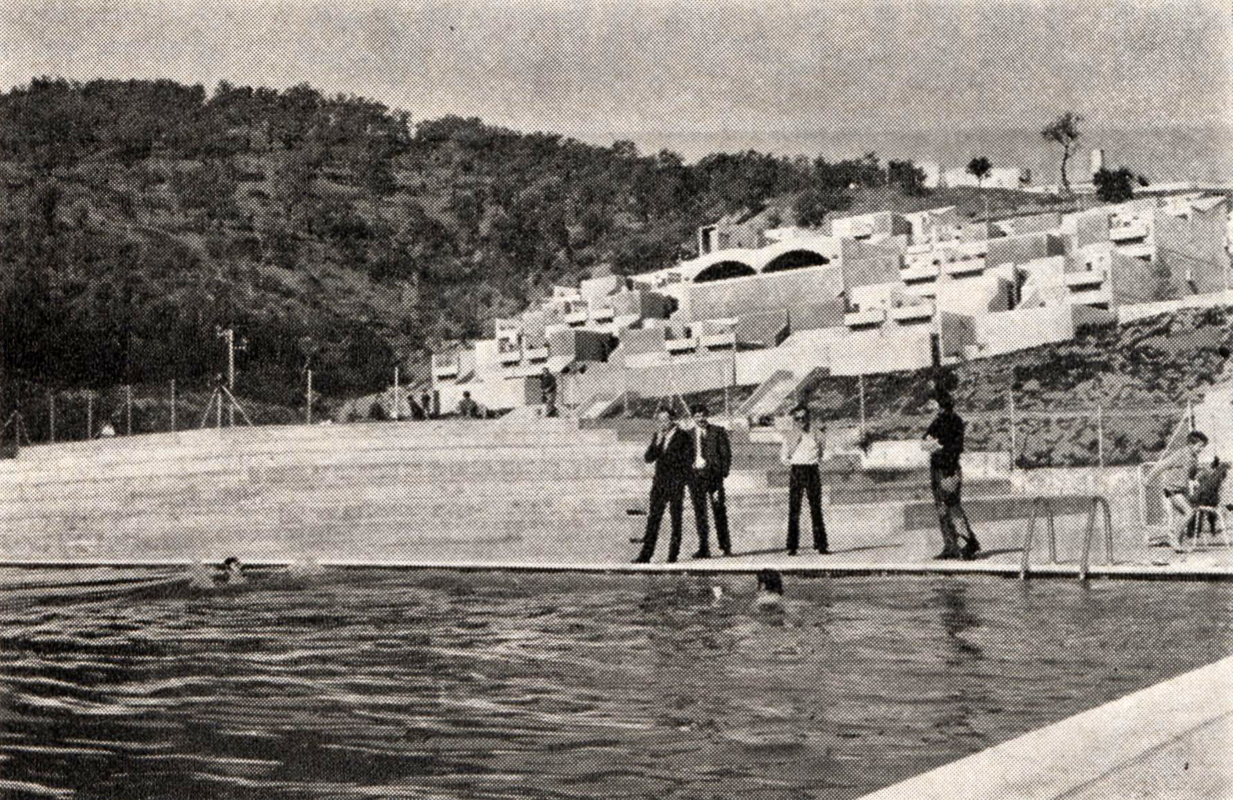 Vue de deux hameaux du village de vacances CCE Air France Le Graffionier à Gassin en 1971 depuis la piscine